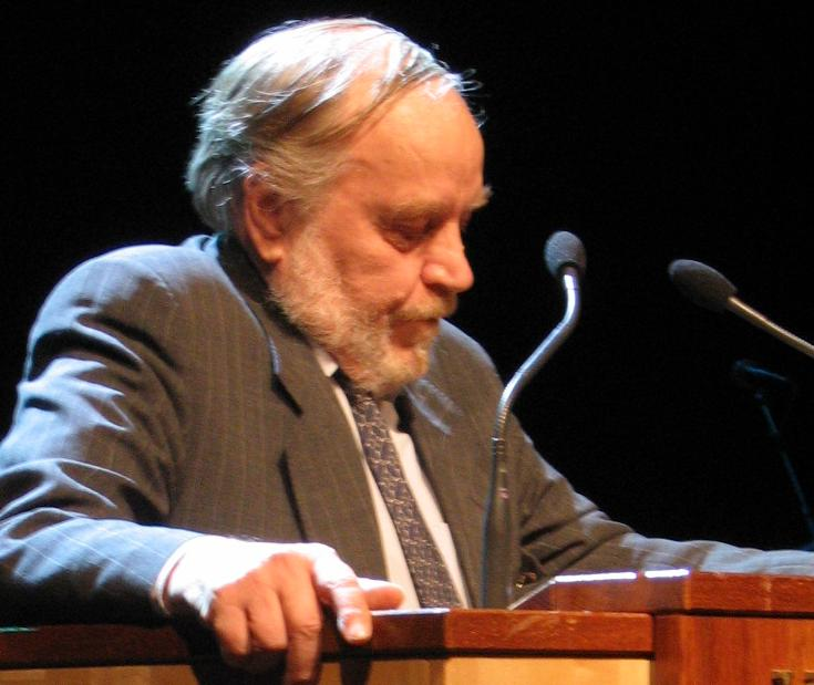 Jukka Peltonen vanhalla ylioppilastalolla